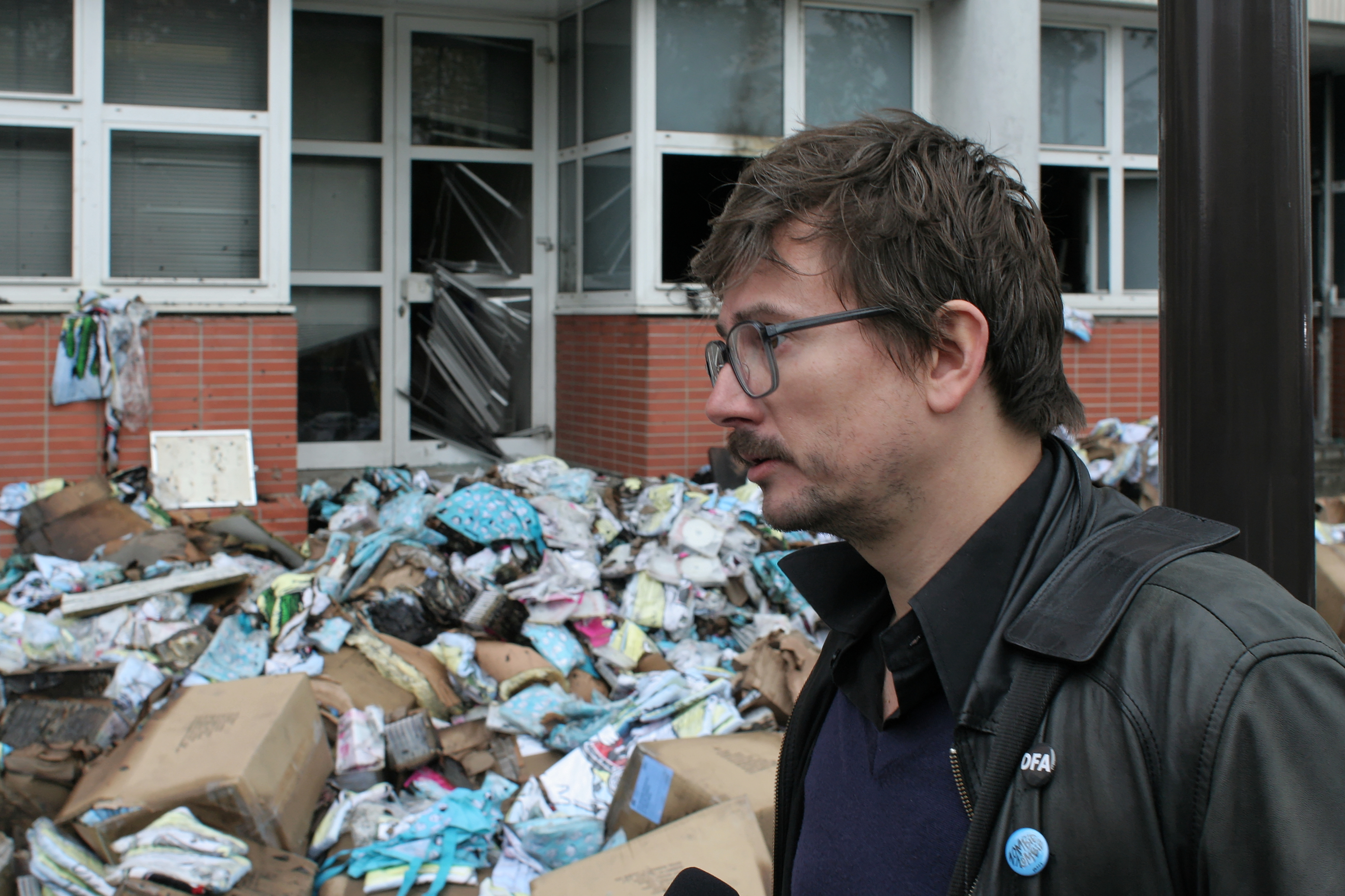 Incendie des locaux de Charlie Hebdo (62 boulevard Davout, Paris) le mercredi 2 novembre 2011. Luz répond aux journalistes devant les débris de l'incendie.